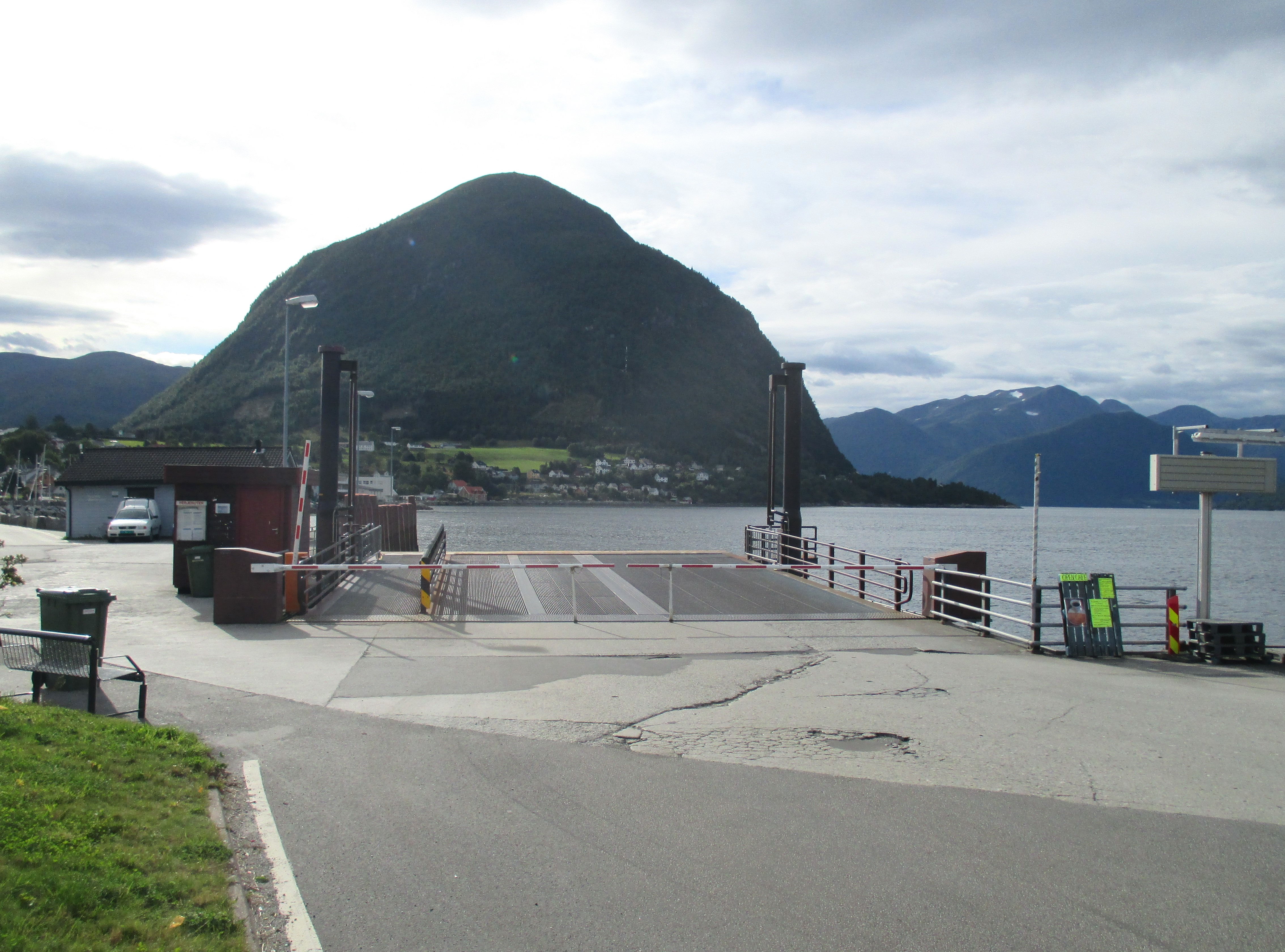 Volda fergekai med Rotsethorn i bakgrunnen